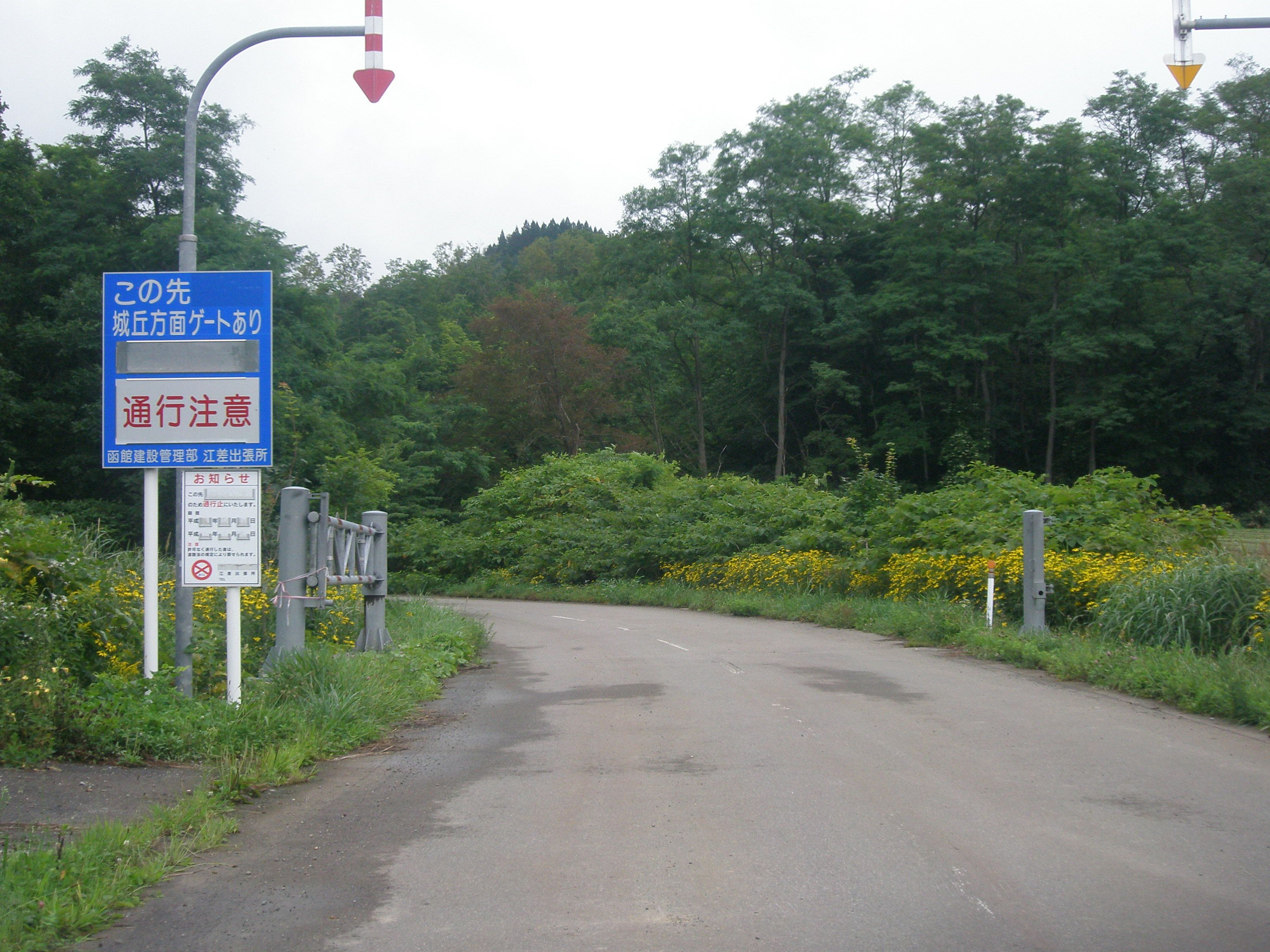 北海道道634号城丘江差線・城丘ゲート（2018年8月撮影）